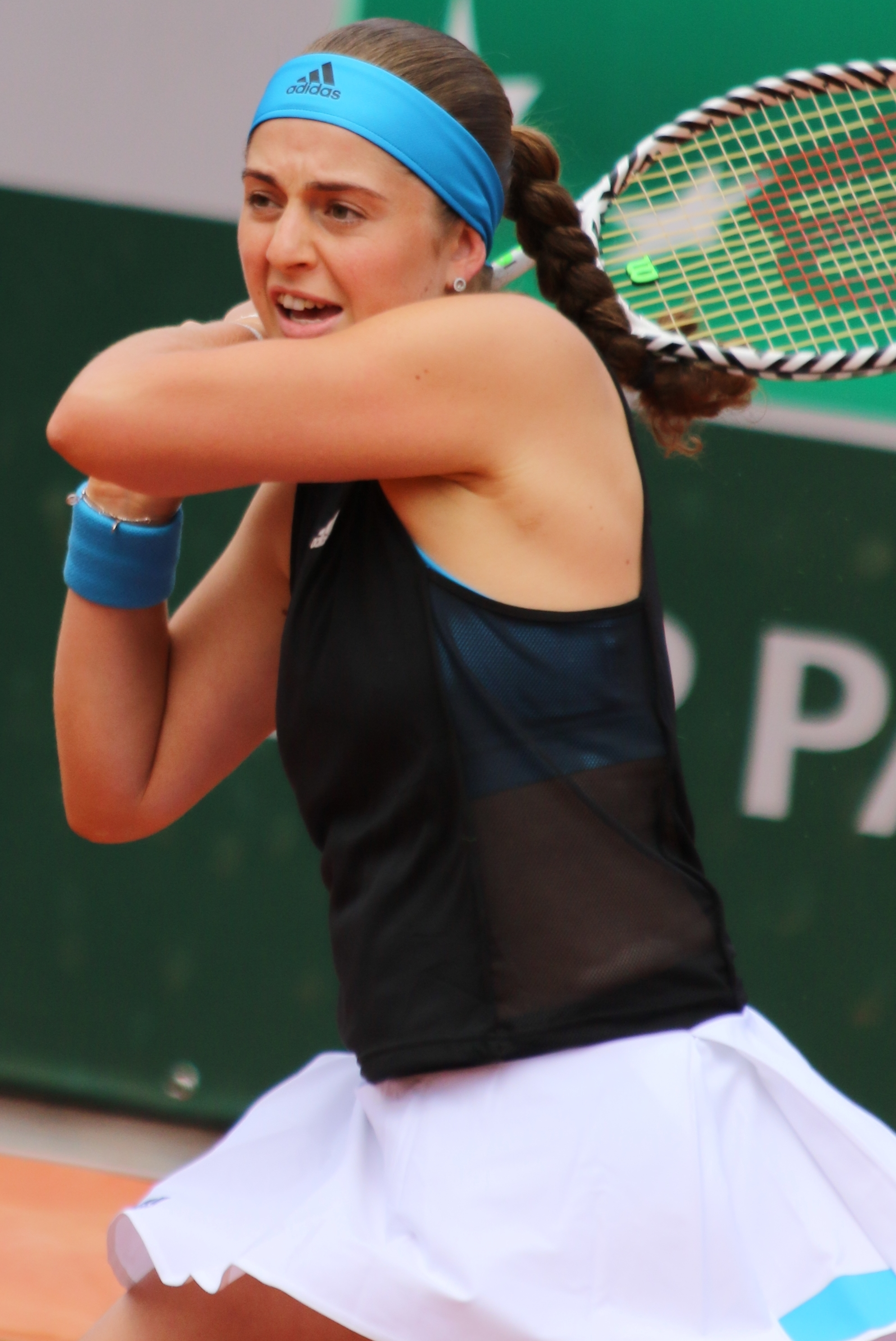 Ostapenko RG19 (31)